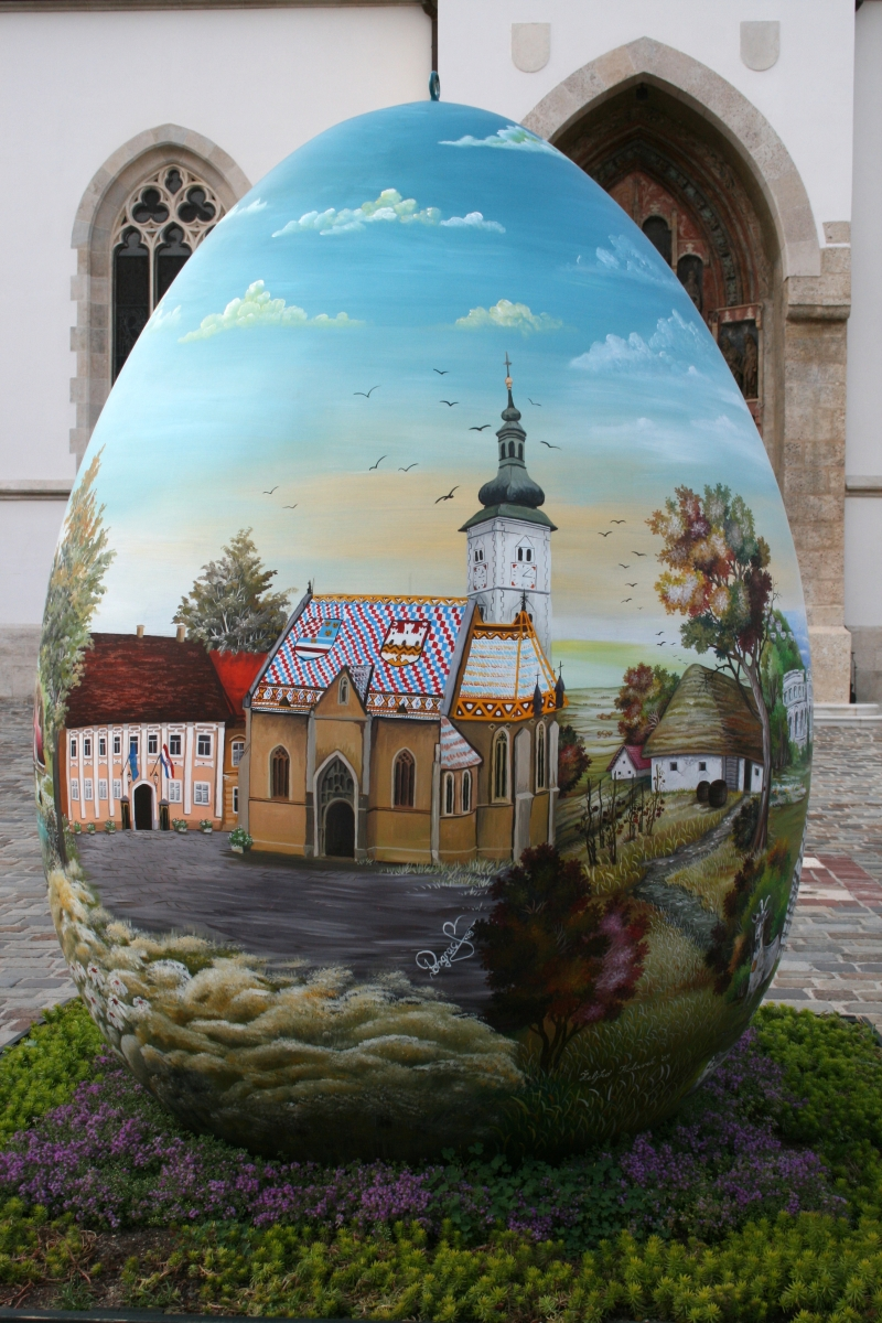 Veliko Uskršnje jaje na Markovom trgu u Zagrebu